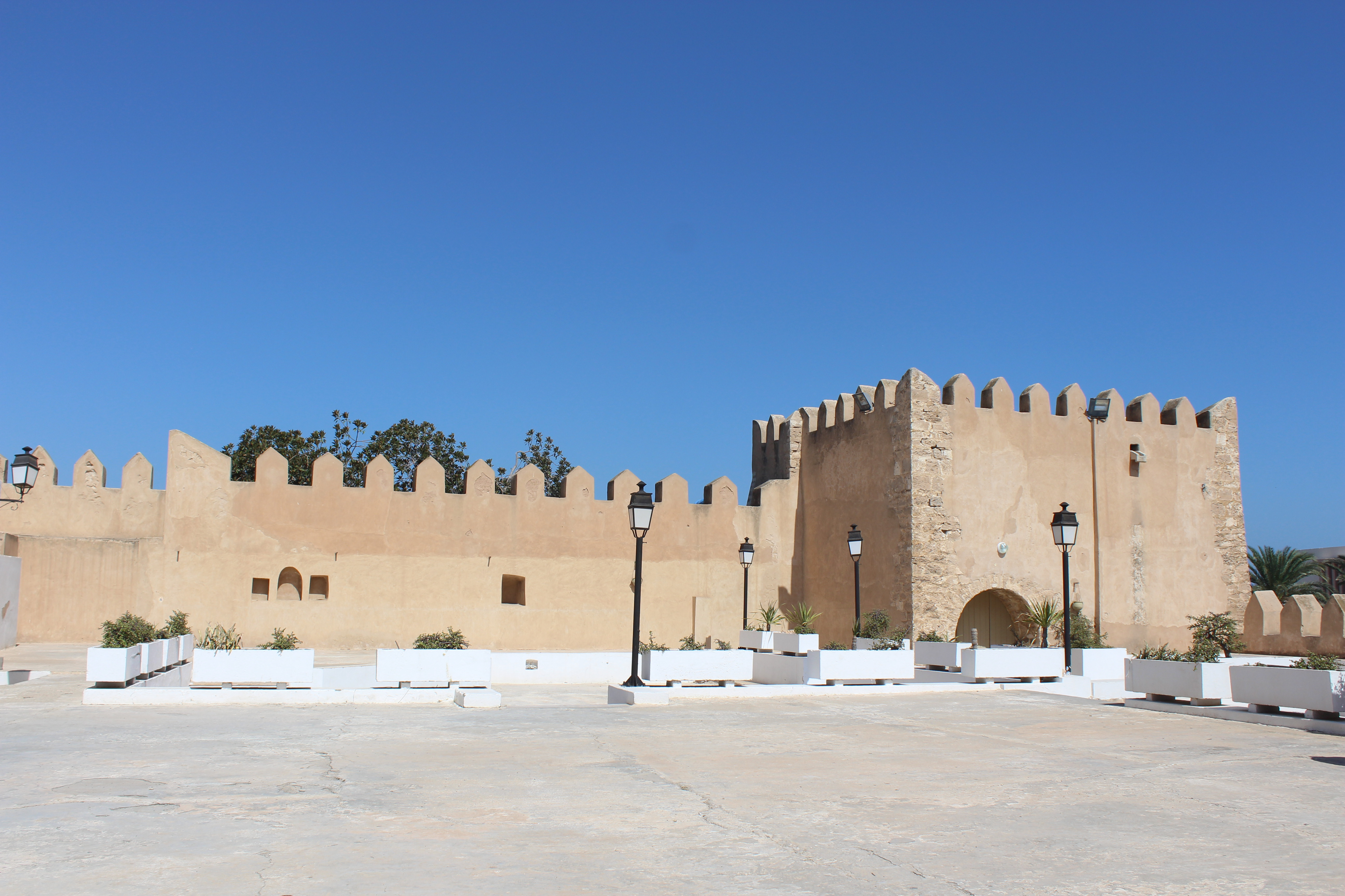 Borj Ennar